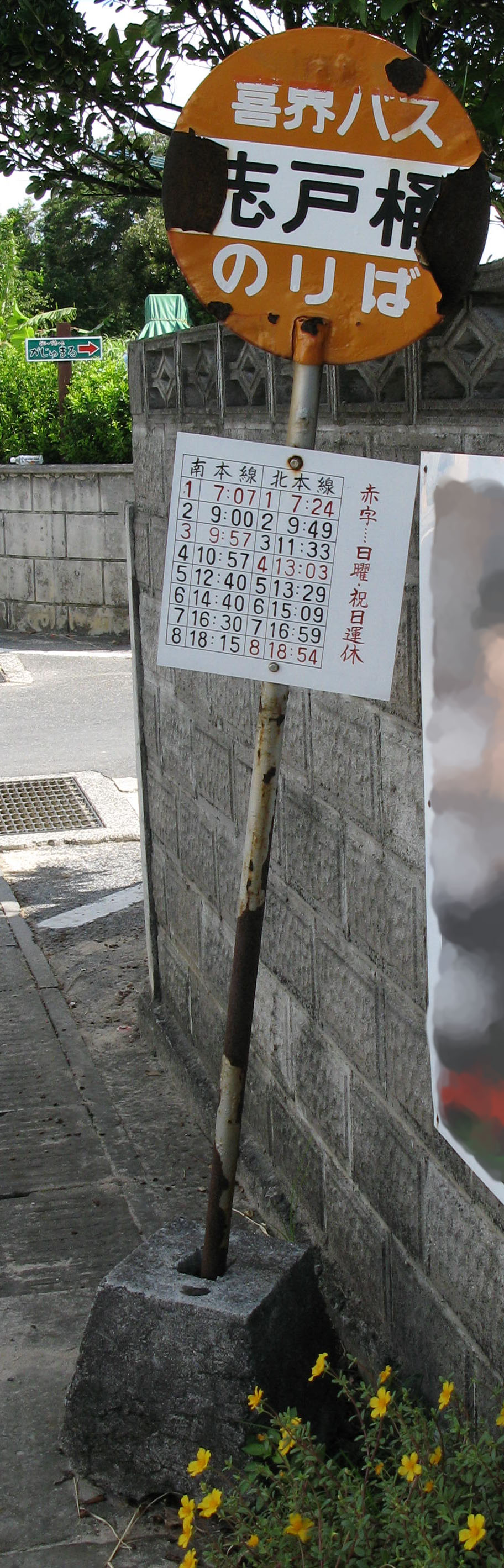 マルエーフェリー 路線バス（喜界島内）のバス停